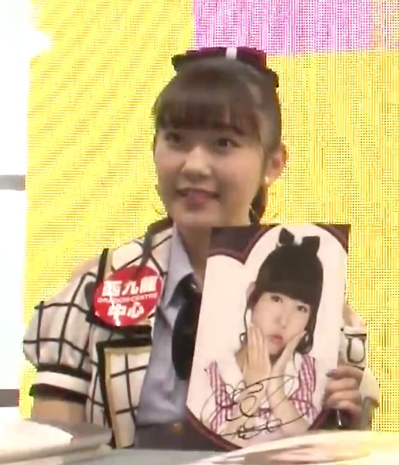 中文（香港）: 多田愛佳 @ HKT48握手簽名會 @ 西九龍中心